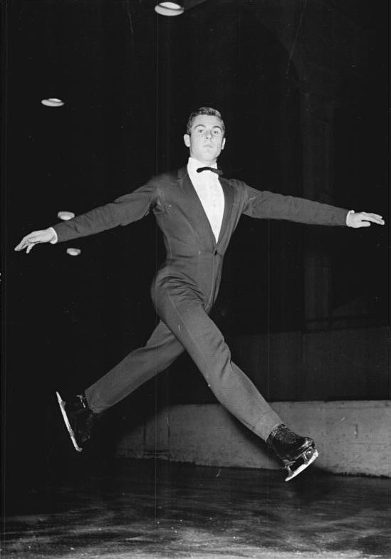 Ralph Borkhardt Zentralbild 28.10.1962 Eiskunstlauf war Trumpf. Die gesamte DDR-Spitzenklasse im Eiskunstlauf traf sich am 27. und 28.10.1962 erneut in der Berliner Werner-Seelenbinder-Halle. Am 27.10. kam es zu der sogenannten "Kleinen Meisterschaft". Sie unterscheidet sich eigentlich von Titelkämpfen nur dadurch, daß am Ende keine Auszeichnungen verliehen werden. Dabei erhalten die Aktiven bei diesen Überprüfungs-Wettkämpfen die nötige Wettkampfhärte. UBz: Zu unseren hoffnungsvollsten Talenten zählt Ralph Borkhardt, der hinter Bodo Bockenauer einen 2. Platz belegte.